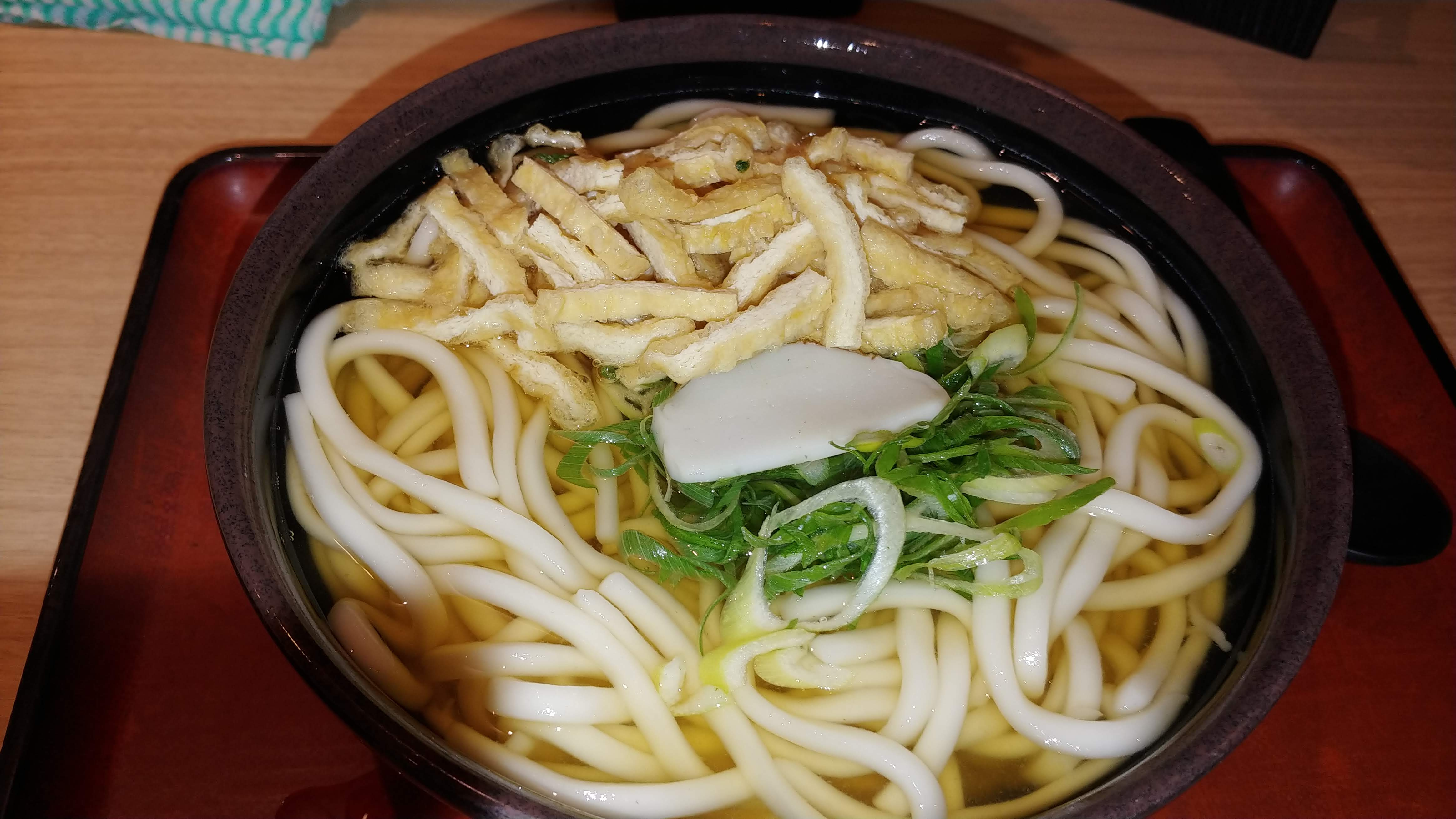 大阪（日本）で一般的な立ち食いうどん屋さんで出てくる「きざみうどん」です